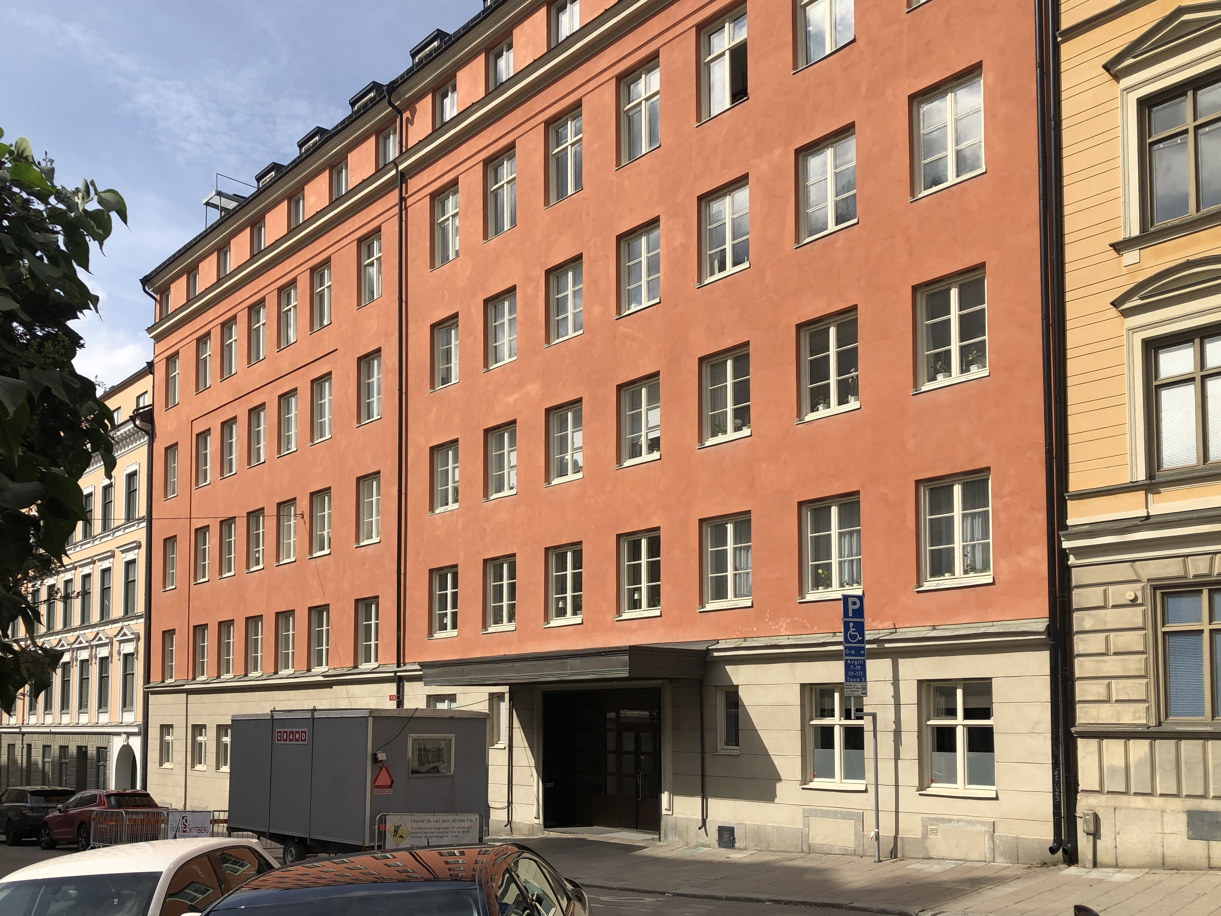 Hinden 21, Grev Turegatan 59 Stockholm Byggnadsår 1879 som bostäder enligt osignerade ritnngar av byggherren och byggmästaren R. Andersson 1911-14: fullständing ombyggnad för Vanföreanstalten. Byggherre: Föreningen för bistånd åt lytta och vanföra. Arkitekt: Ernst Stenhammar. 1936-38: Fullständig ombyggnad till Betaniastiftelsens sjukhus. arkitekt: Åke Tengelin